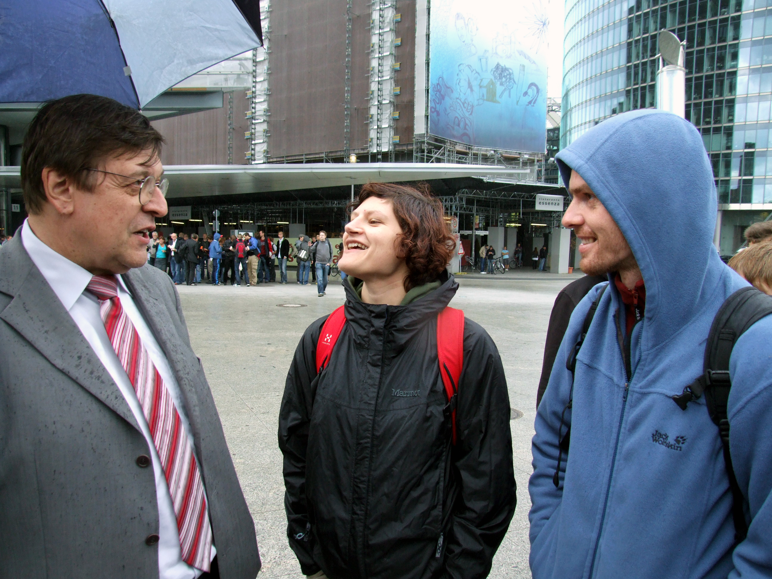 Jörg Tauss, Franziska Heine und Christian Bahls nach einer Demonstration gegen Internetsperren